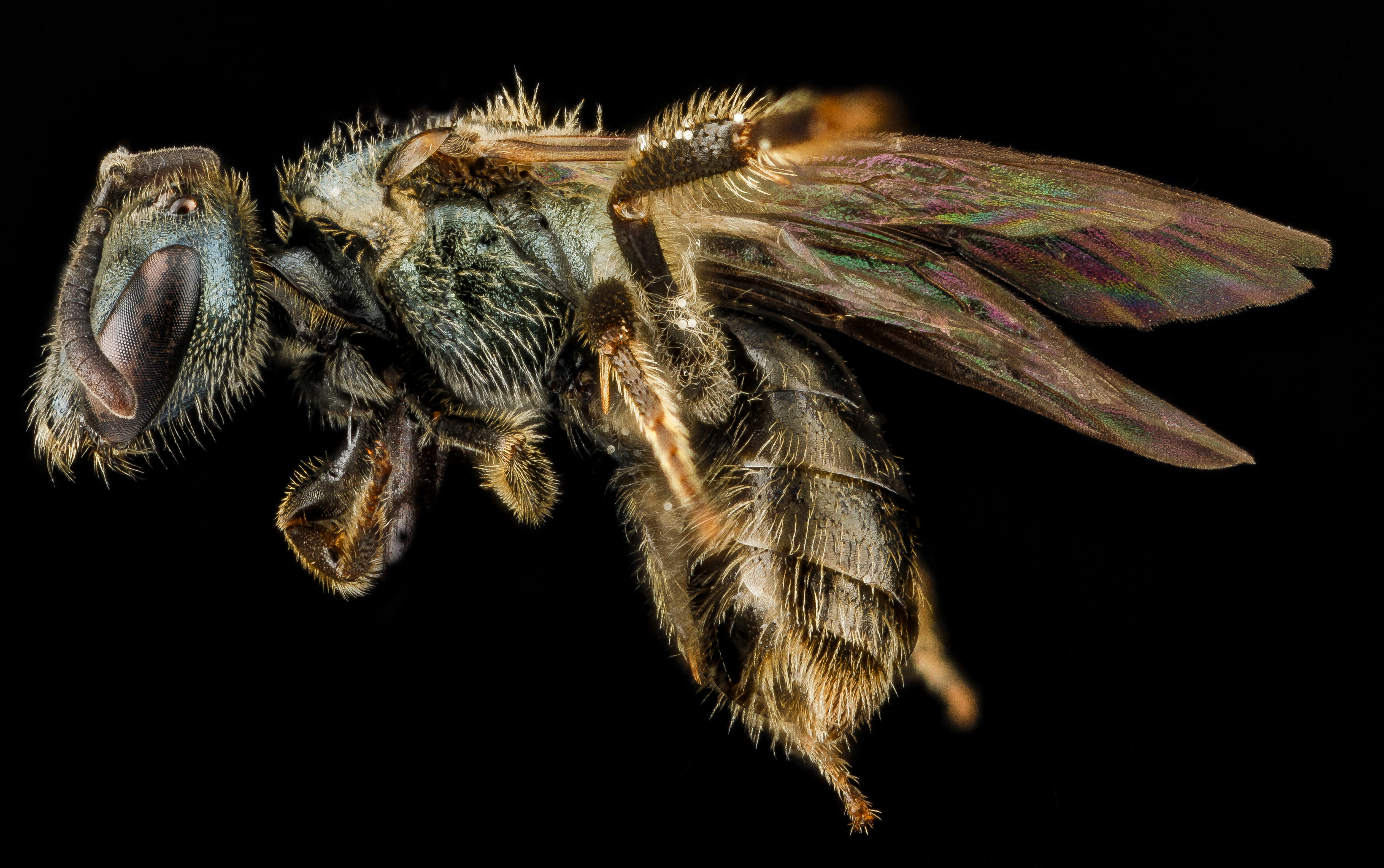 Lasioglossum taylorae, female.